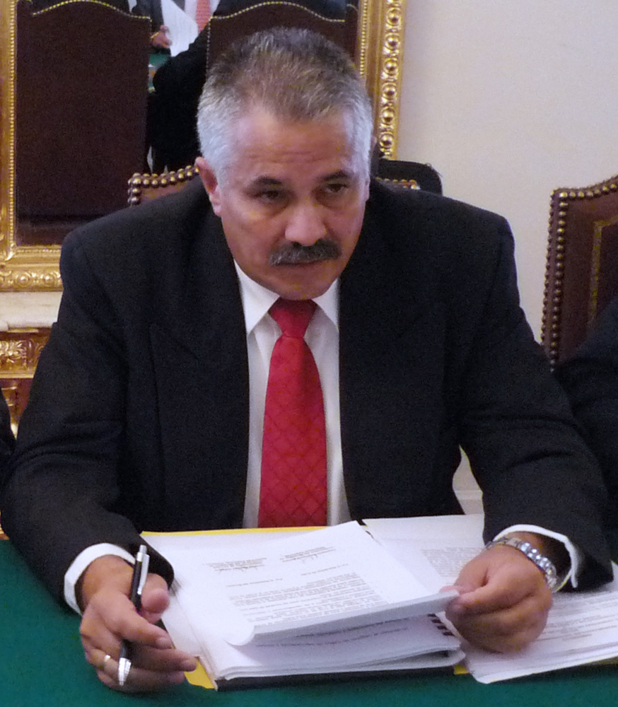 Cancillería, Quito-Ecuador 20 de septiembre de 2010